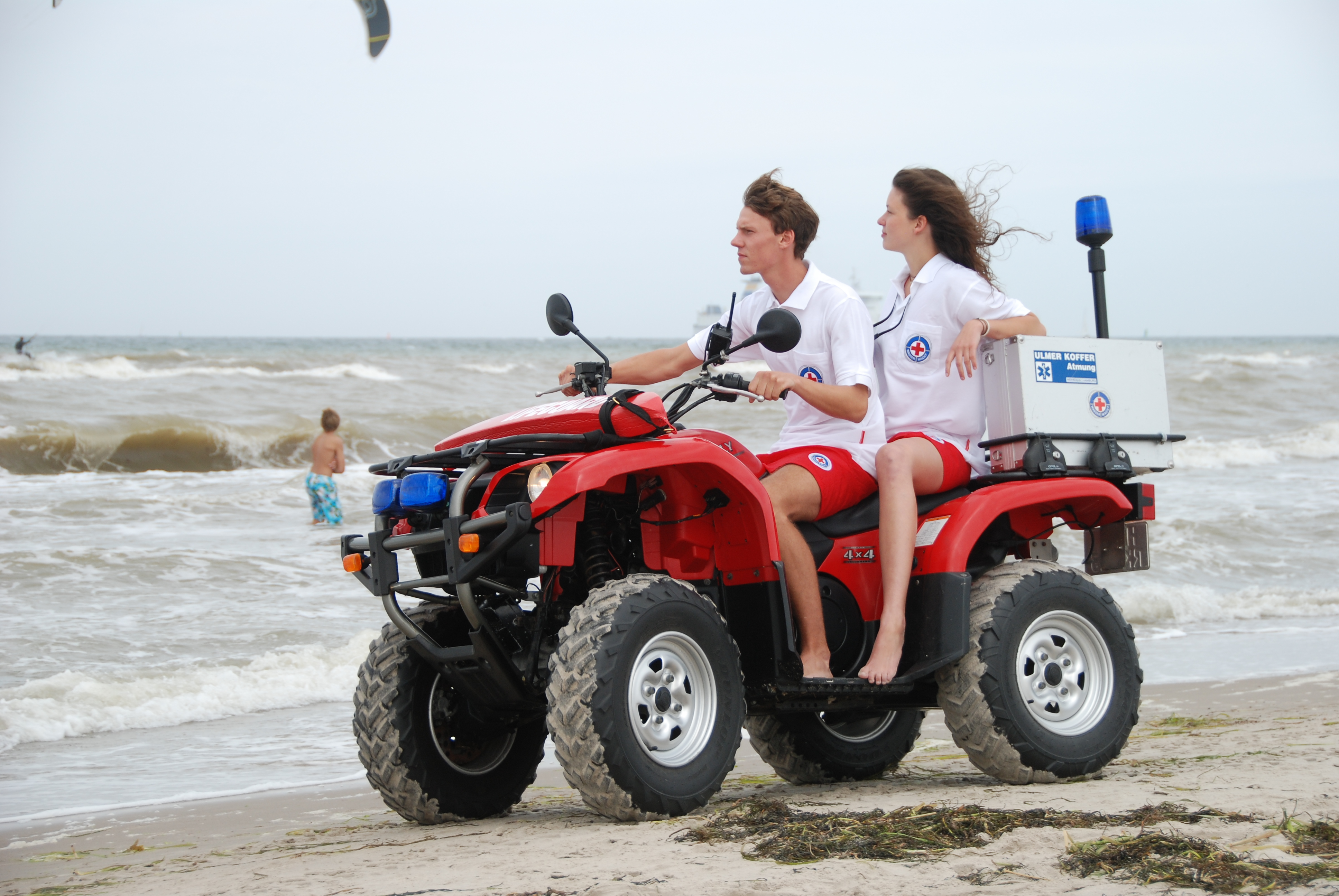 Einsatzfahrzeug der Wasserwacht, DRK KV Rostock (Warnemünde)